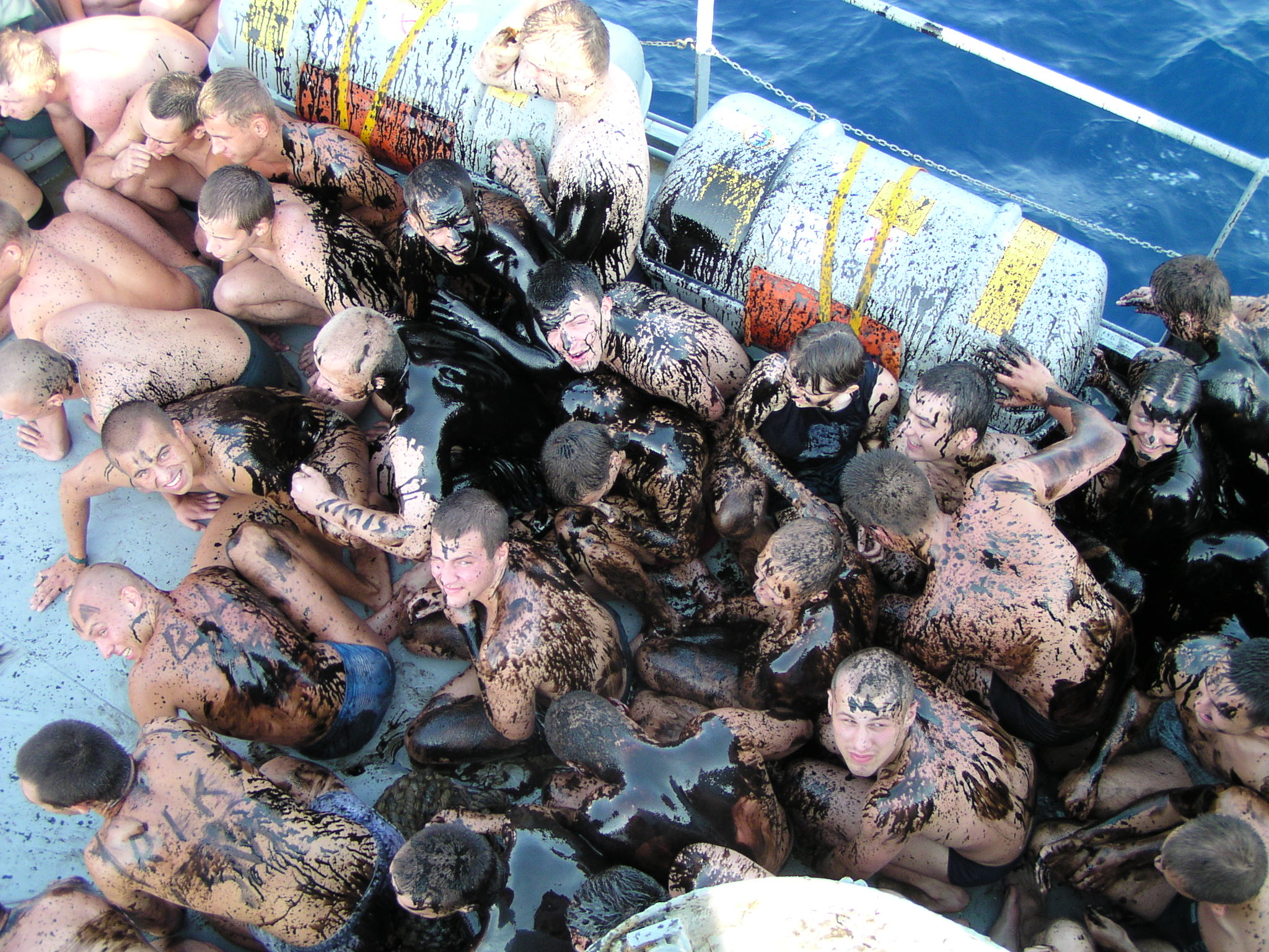 Chrzest morski na ORP Wodnik